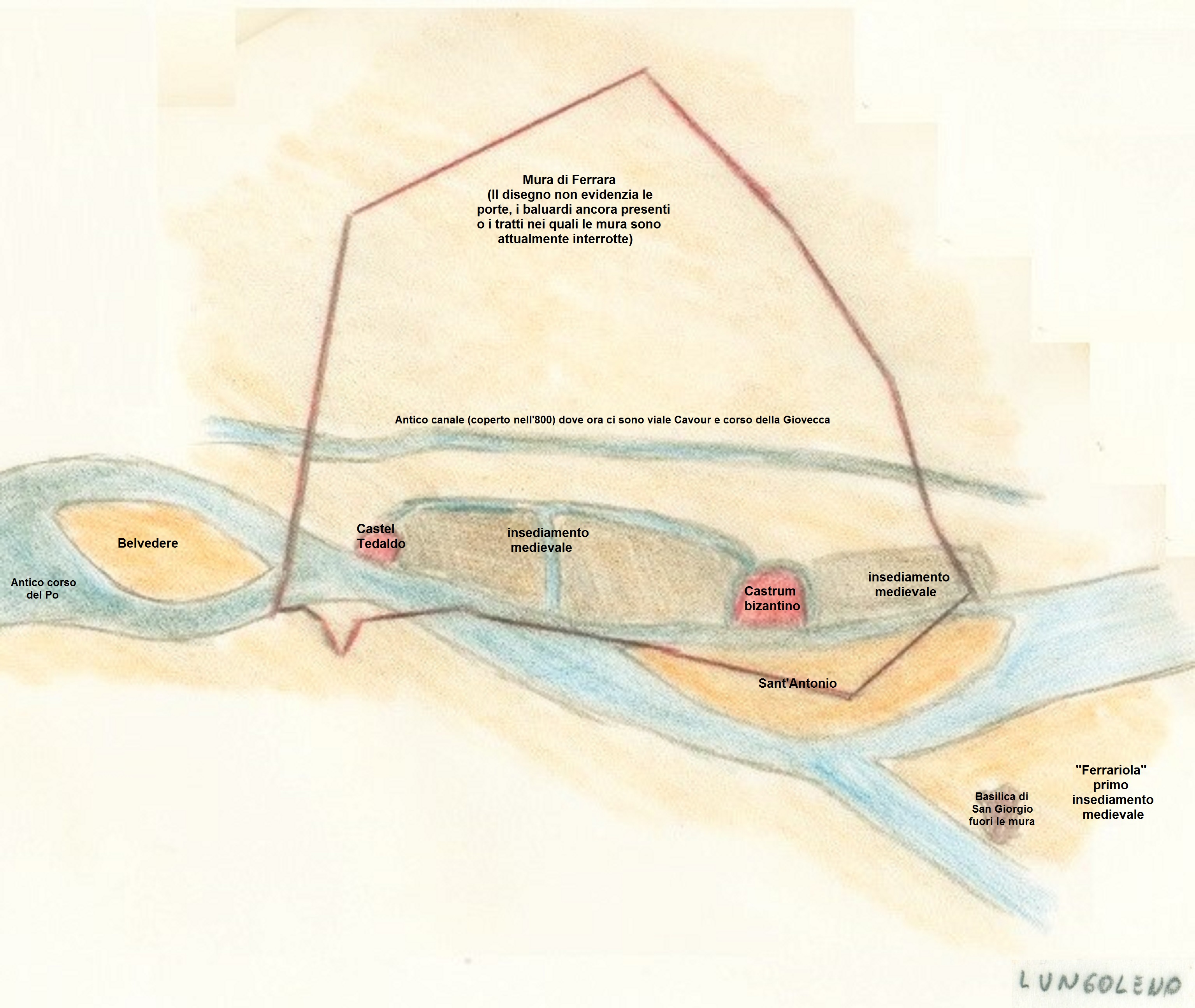 Elaborazione su scale temporali diverse e da varie carte d'epoca (a partire dal VI secolo) per evidenziare le posizioni che occupavano sulla piantina attuale di Ferrara l'antica Ferrariola, il Castrum, Castel Tedaldo, l'isola di Belvedere e le mura (in una visione approssimativa e d'insieme)